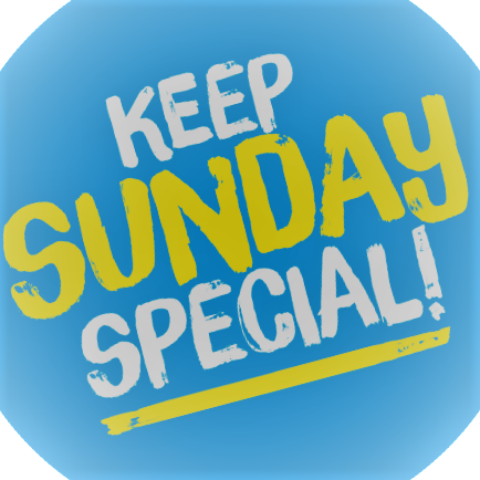 Keel Sunday Special.